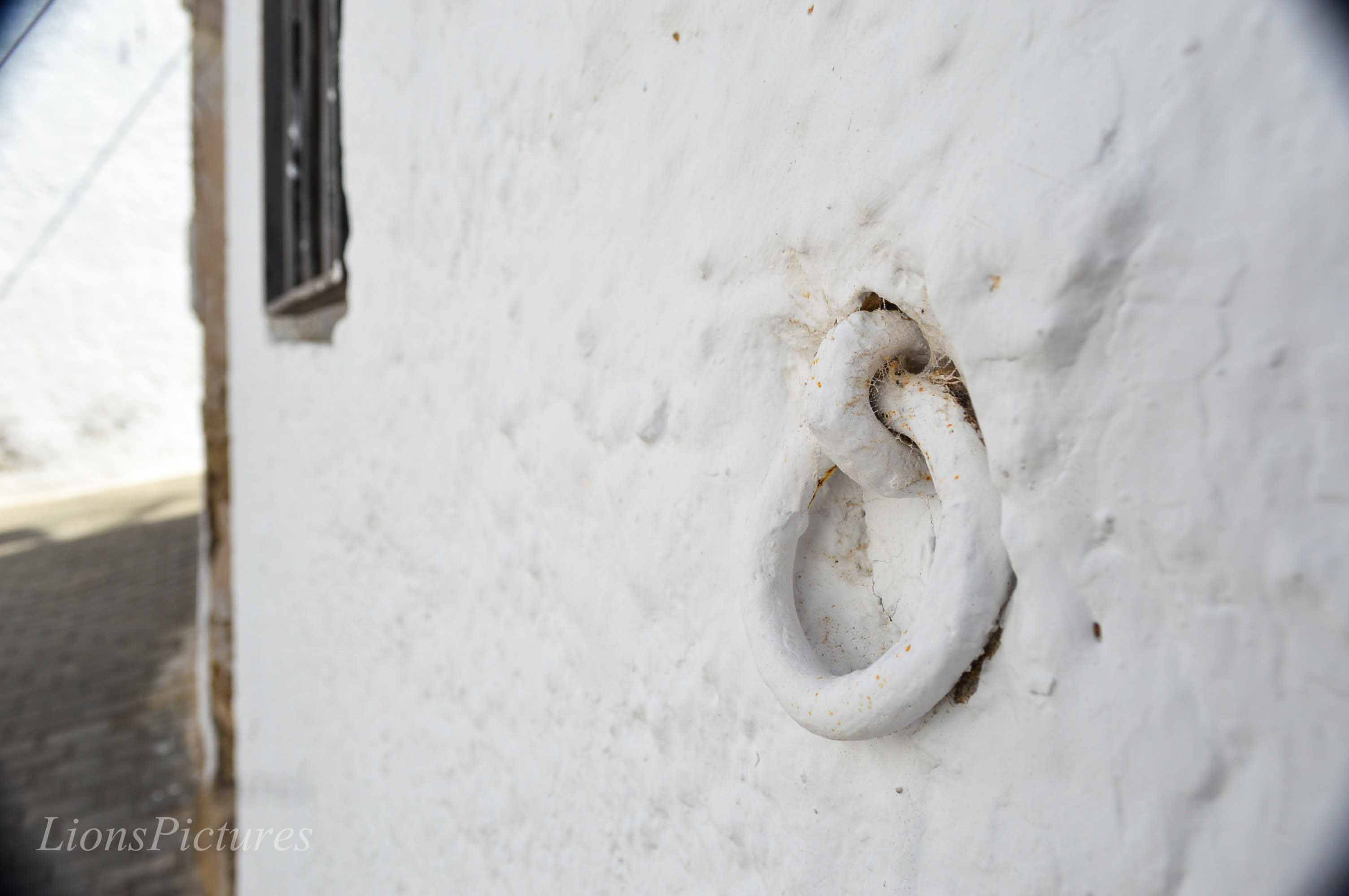 Argolla típica para amarrar las bestias, en la entrada de las casas, Benitagla